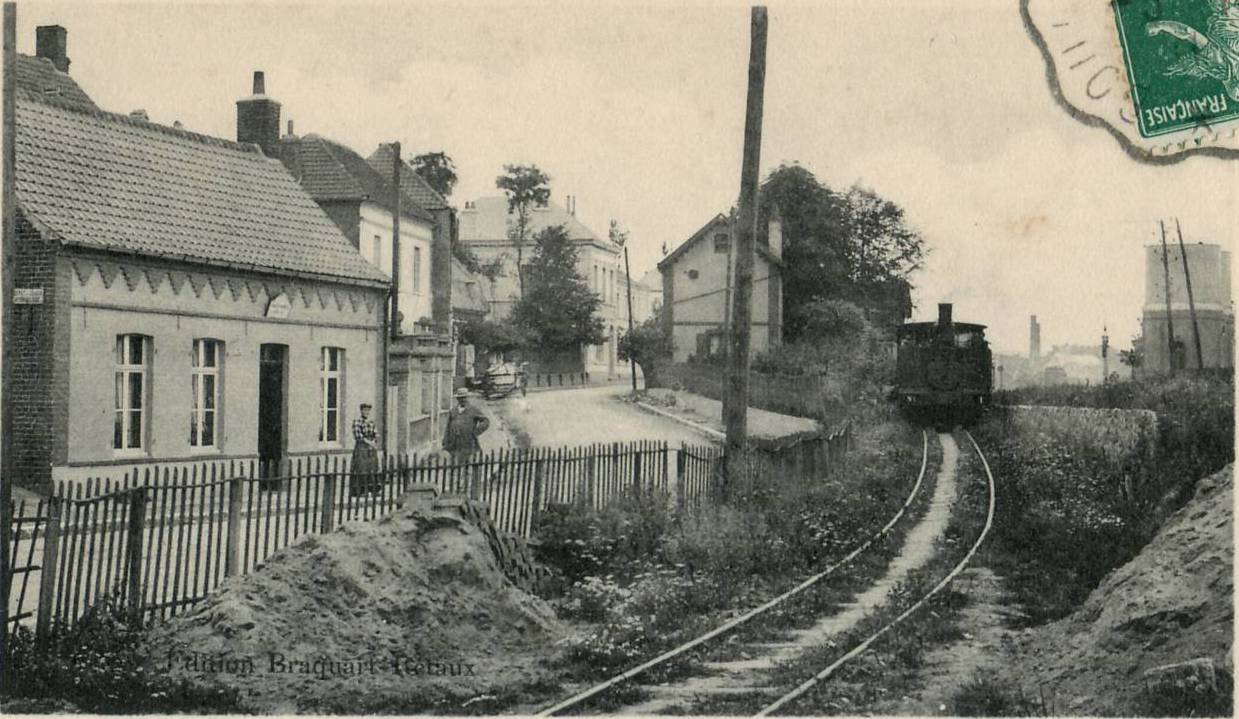 Carte postale ancienne éditée par Braquart-Trétaux :LUMBRES - La rue de Saint-Pierre.Vue d'une rame du chemin de fer d'Anvin à Calais